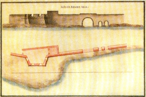 "Forte da Ribeira Seca", s/d, autor desconhecido, Arquivo Histórico Militar, Lisboa. in MARTINS, José Salgado, "Património Edificado da Ilha Terceira: o Passado e o Presente". Separata da "Atlântida", vol. LII, 2007. p. 37. Também integrante da "Colecção de Plantas e Alçados de 32 Fortalezas dos Açores, por Joze Rodrigo d'Almeida em 1830", José Rodrigo de Almeida, 1830 (c.) GEAEM (346-1-8A-96), Lisboa, Portugal.